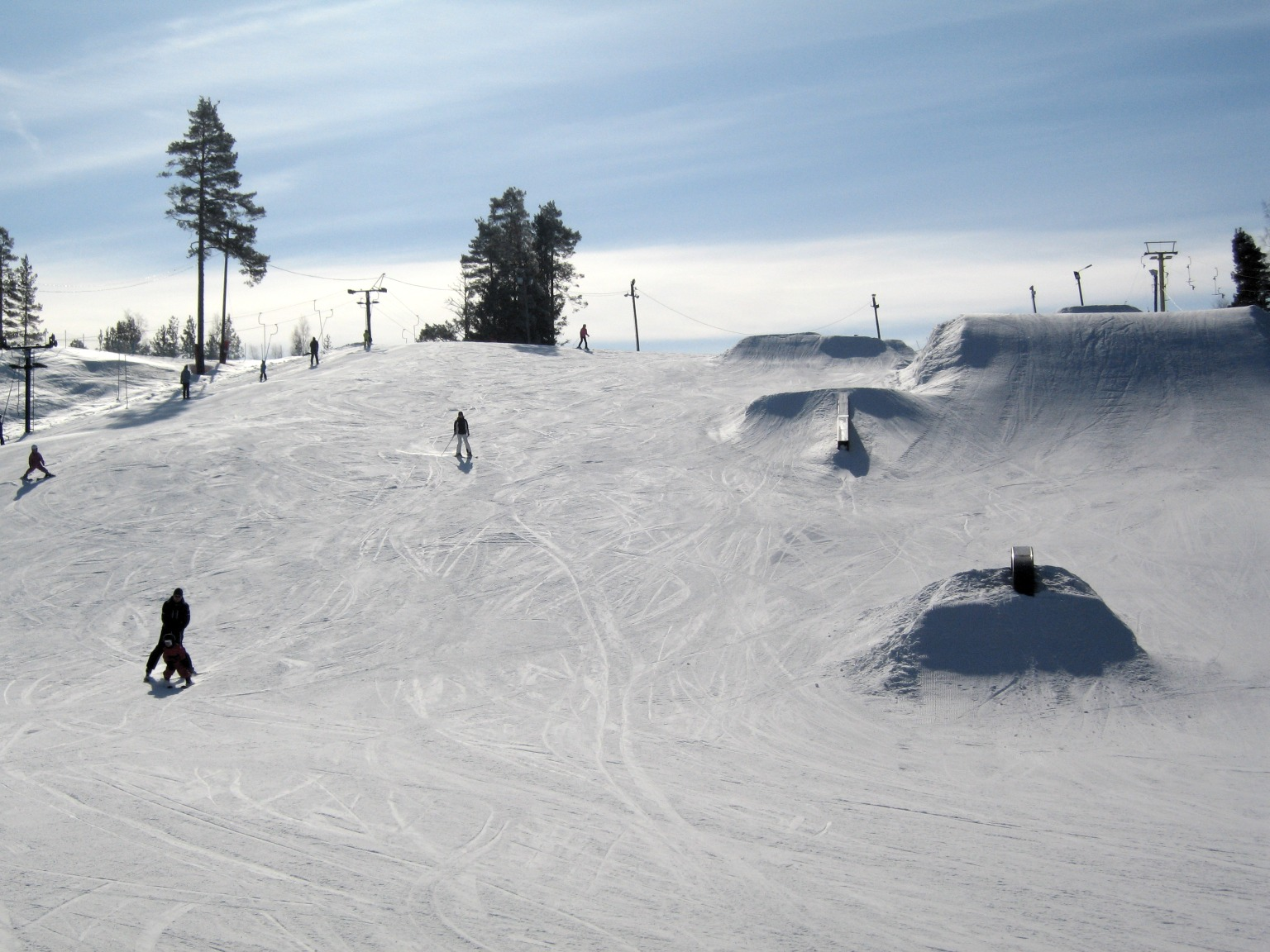 Peuramaa Skin päärinne Kirkkonummella